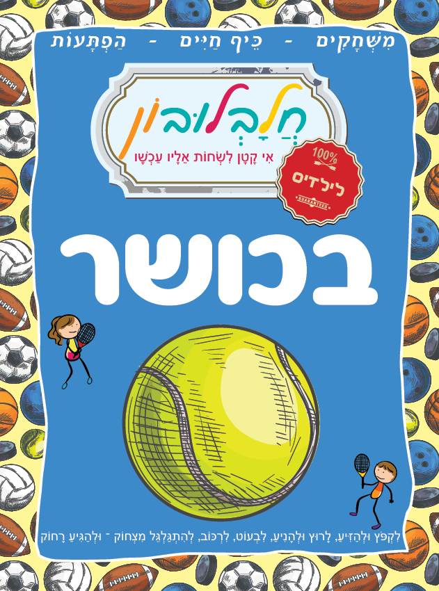 מגזין לילדים מודפס חלבלובון